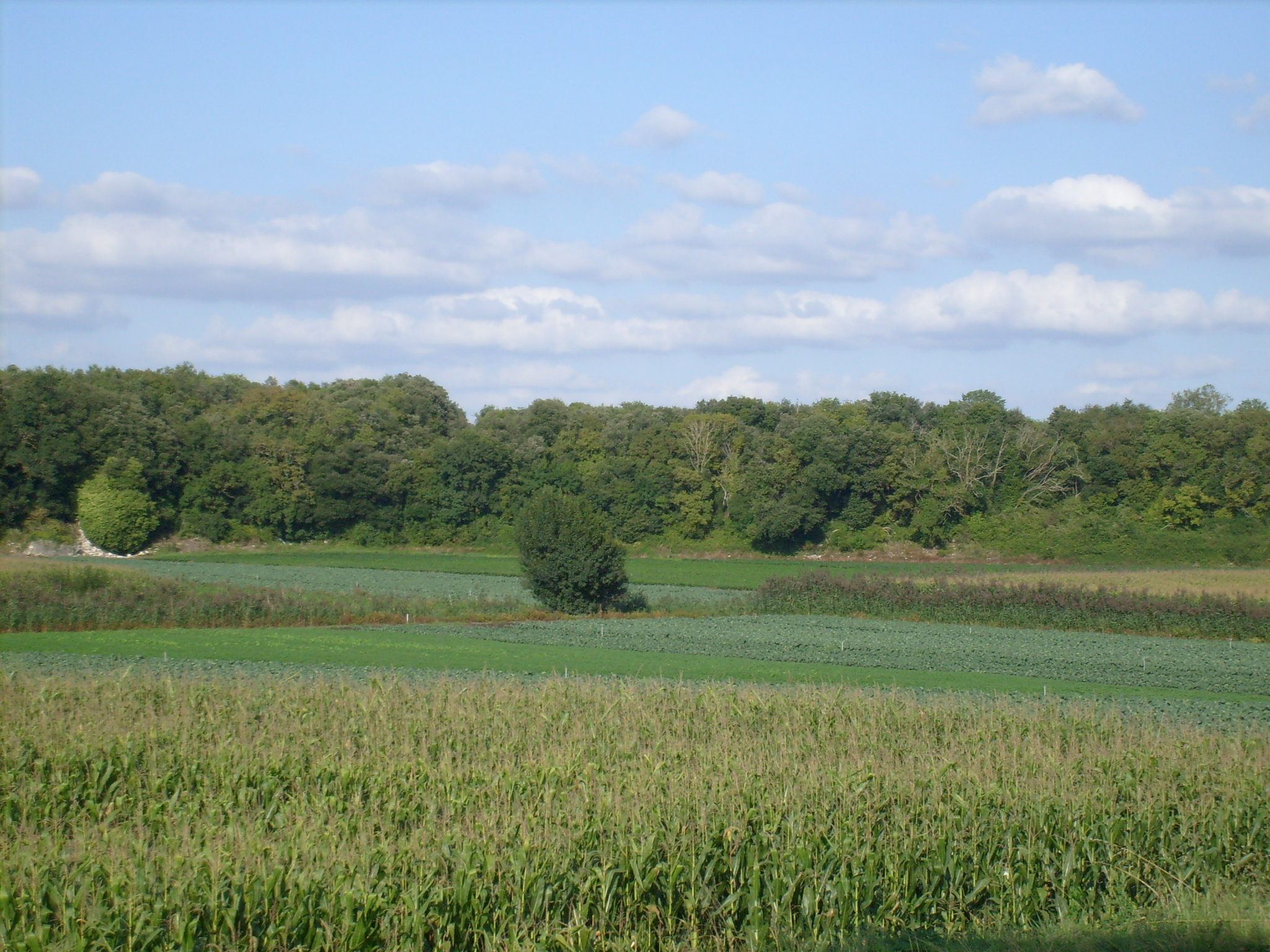 Les alentours de Trizay